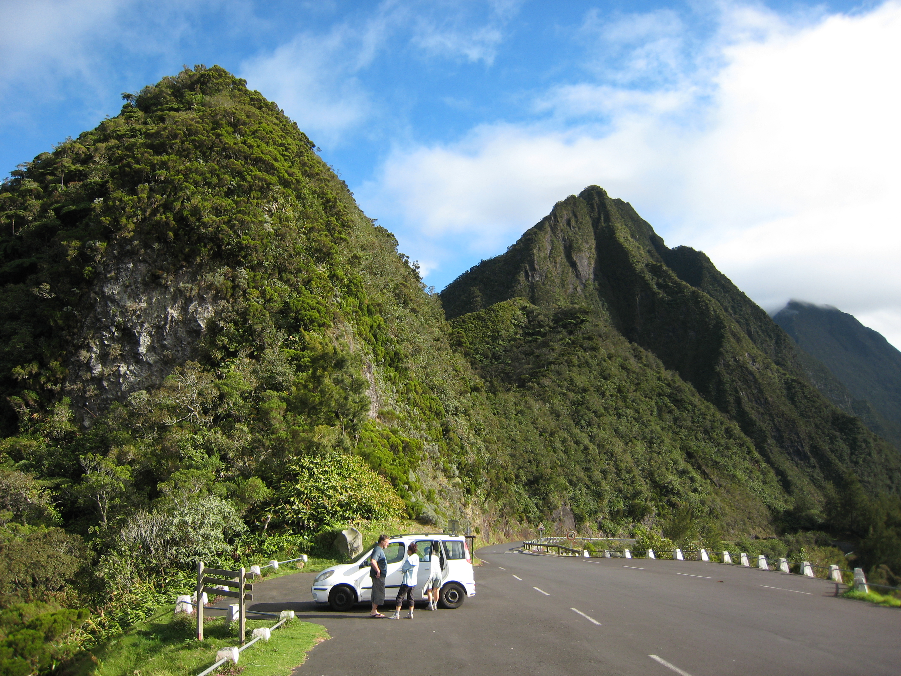 Parking le long de la route forestière du Haut Mafate, à La Réunion.